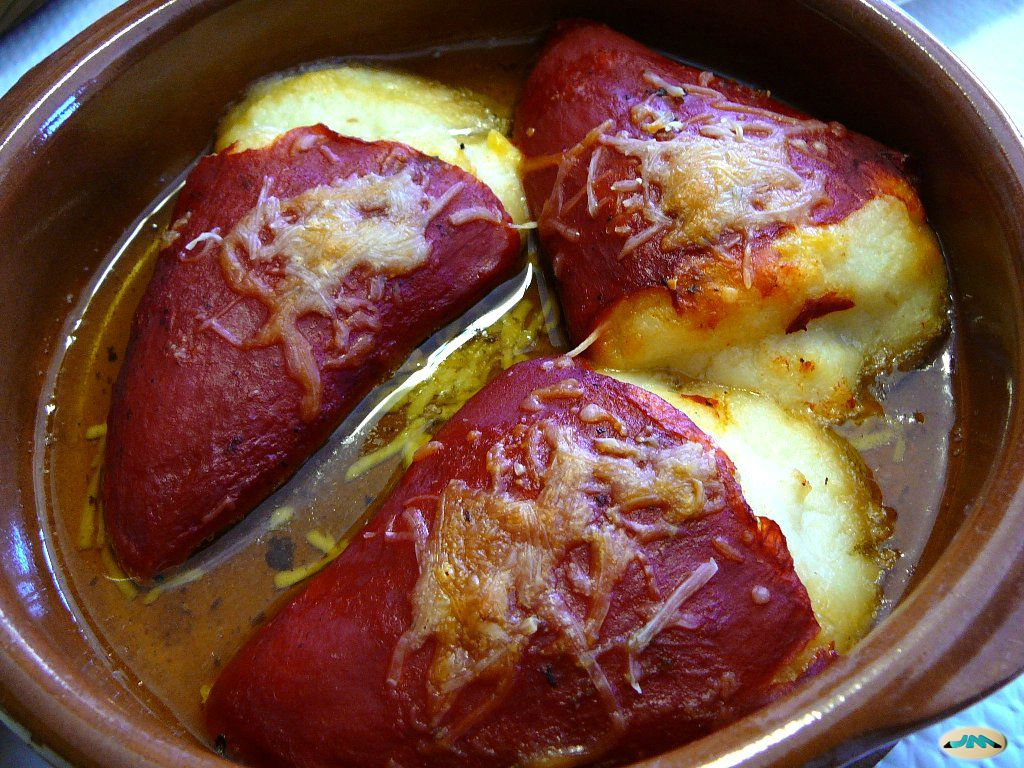 Pimientos del piquillo rellenos